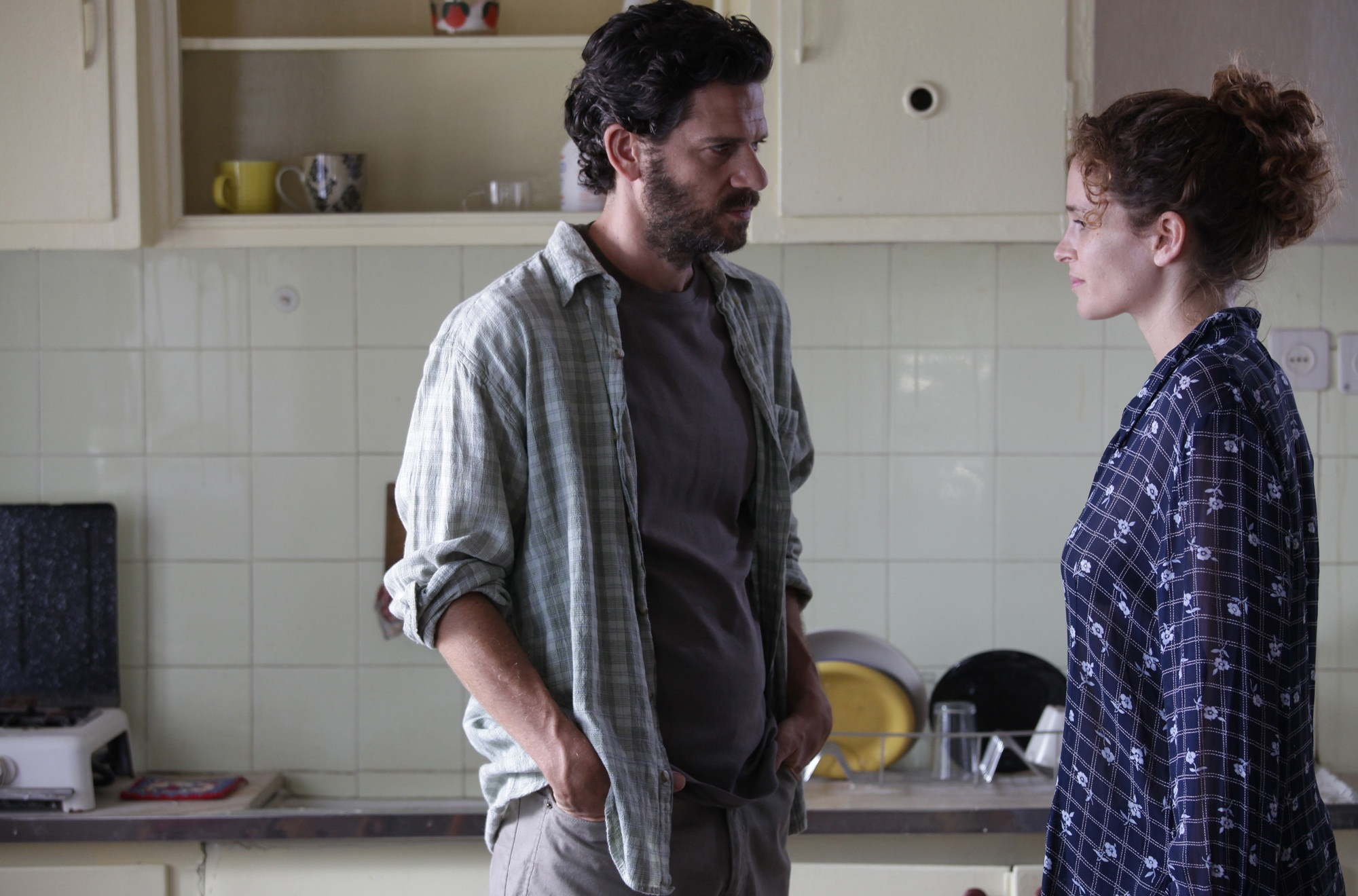 הגר בן-אשר וישי גולן בסרטה של בן-אשר "הנותנת", 2011